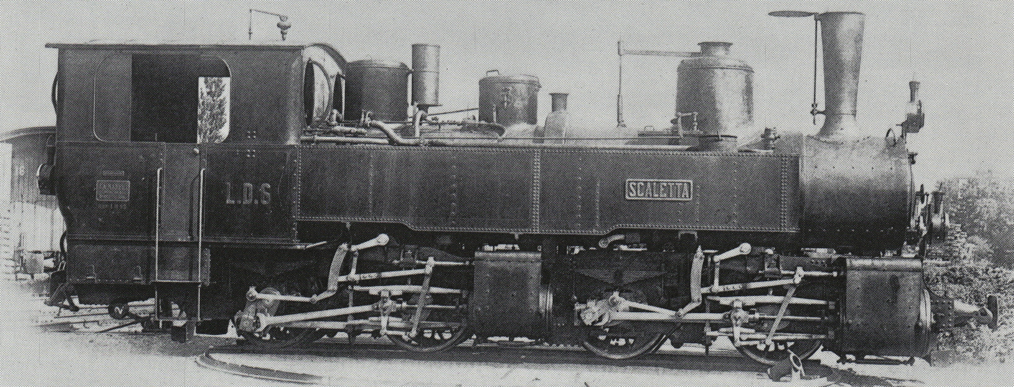 Tender-Locomotive G 2×2/2 Nr. 6 Scaletta der Landquart-Davos-Bahn, gebaut 1891 inn der Locomotiv-Fabrique J. A. Maffei zů München (Fabr.-Nr. 1613), 1895 als Nr. 21 von der Rhätiſchen Bahn übernommen, 1911 mit neuem Keſſel und einer führenden Laufachſe ausgeſtattet, 1920 an die Braſiliſche Rede Sul Mineira verkauft, 1931 von der Rede Mineira de Viação übernommen, 1933 mit Schlepp-Tender ausgerüſtet, 1939 außer Dienſt geſtellt und anſchließend abgebrochen.